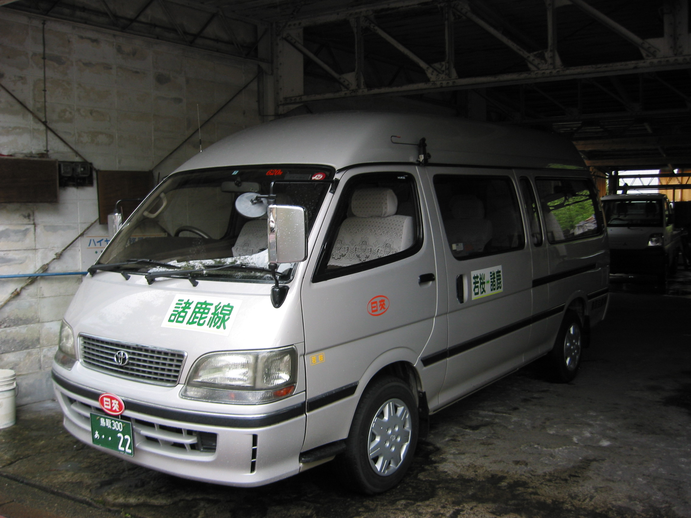 鳥取自動車 乗合タクシー諸鹿線（現在は廃止）の車両